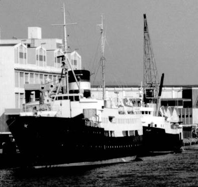 Hurtigruten Polarlys, Yrjar og en tredje, ukjent båt langs Pir II.